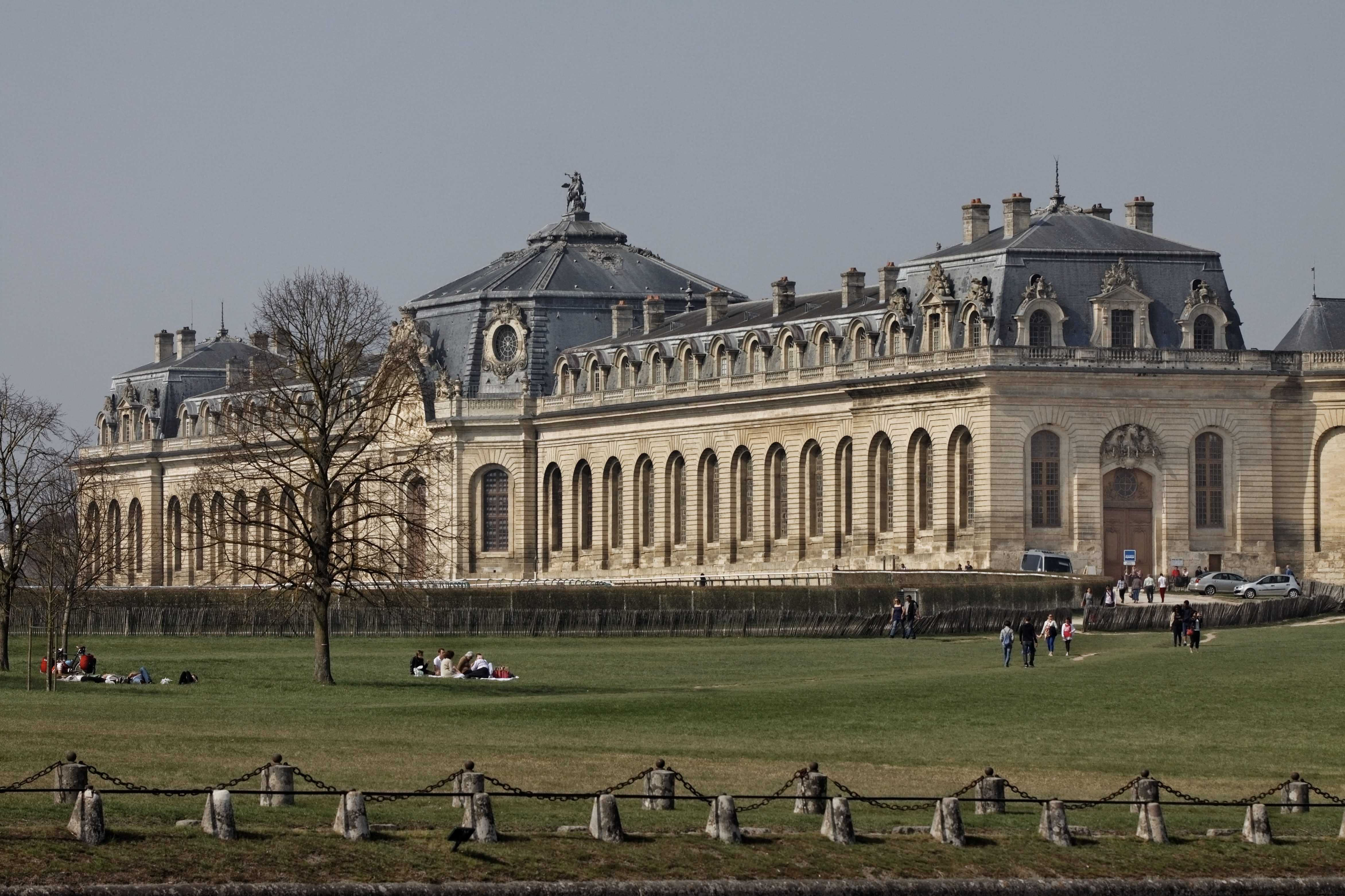 Le musée vivant du cheval à Chantilly.